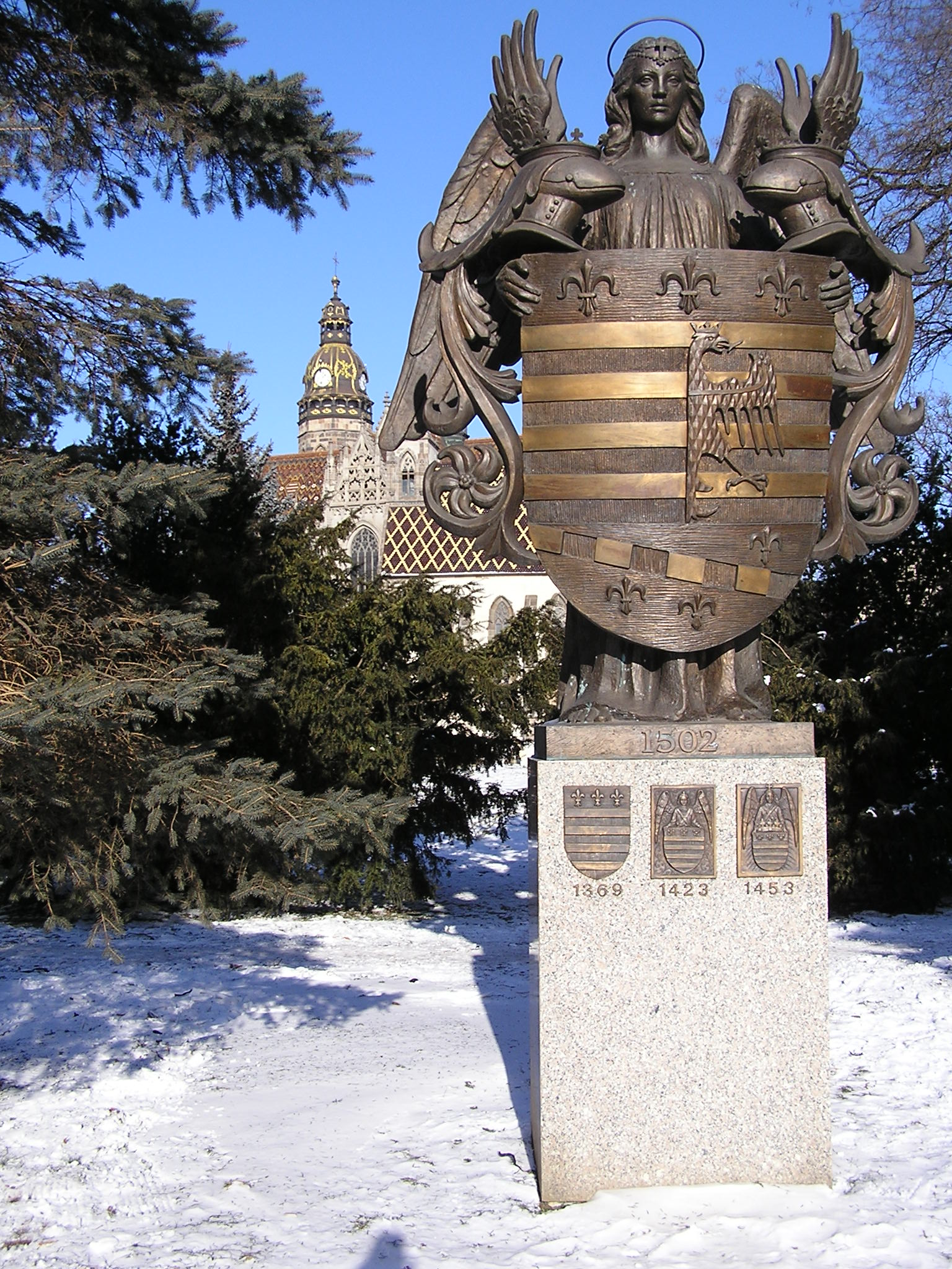 Autor: Marian Gladis